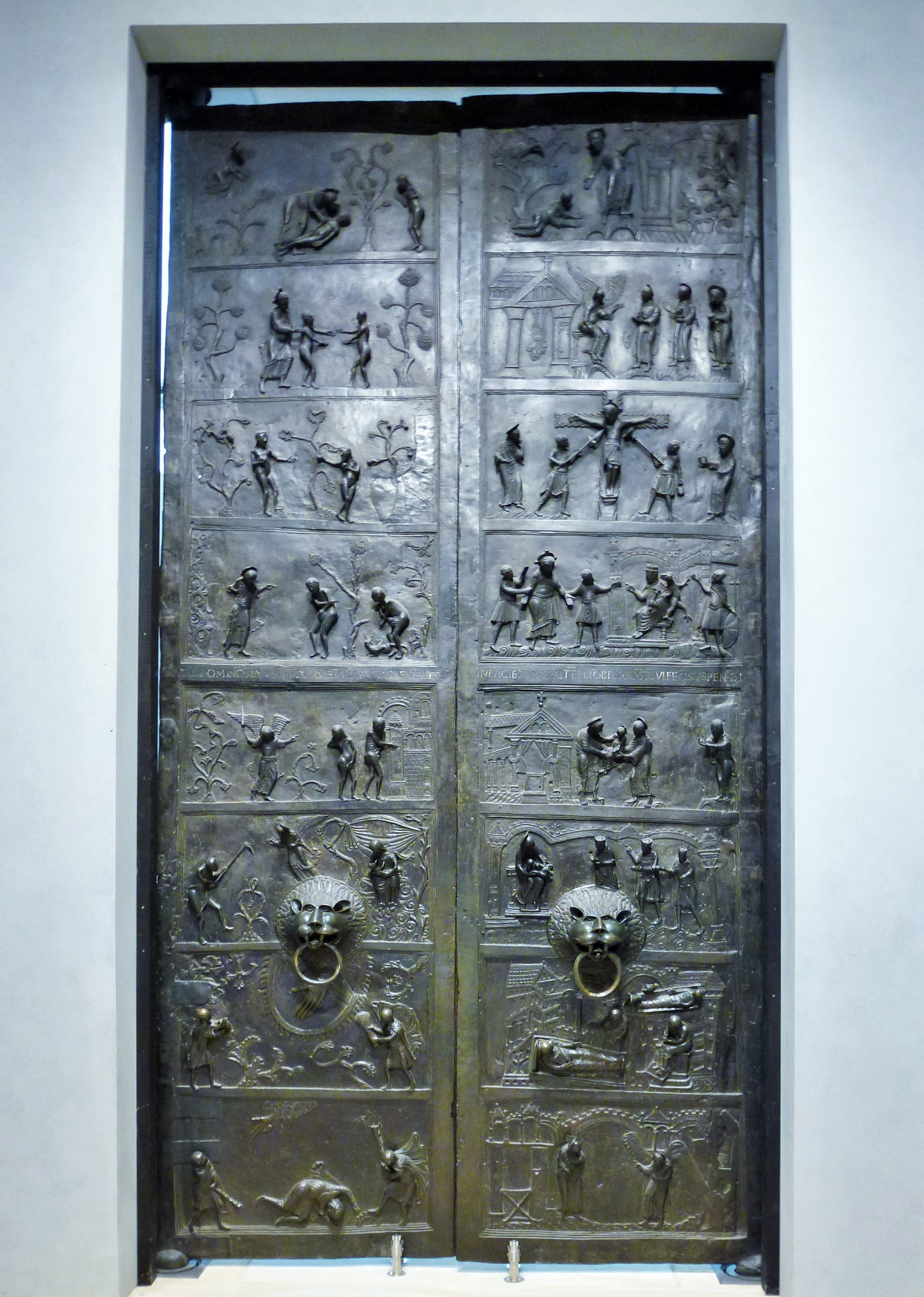 Mariendom Haupteingangstür aus Bronze